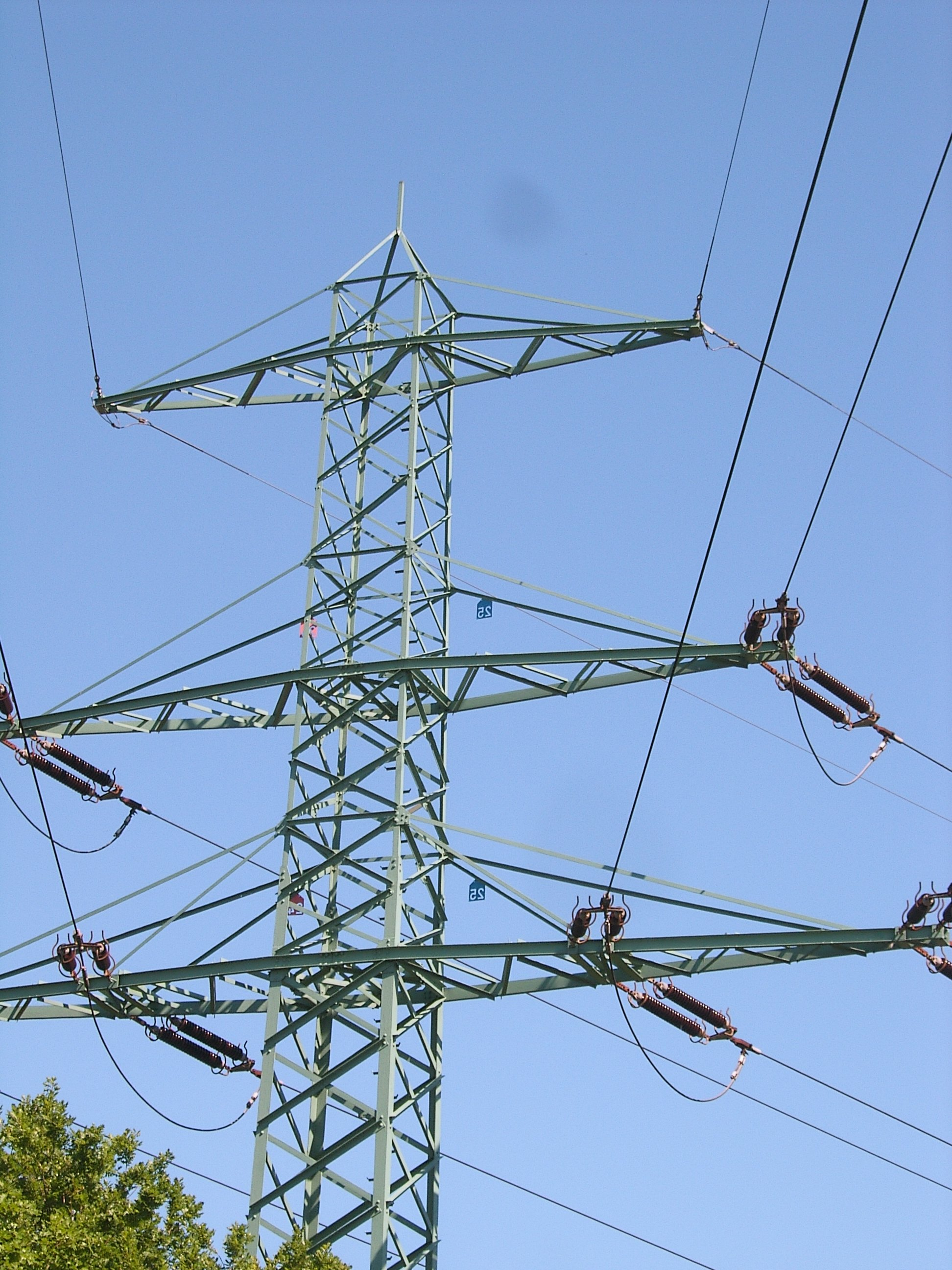 Freileitung 110 kV, Hamburg-Bramfeld